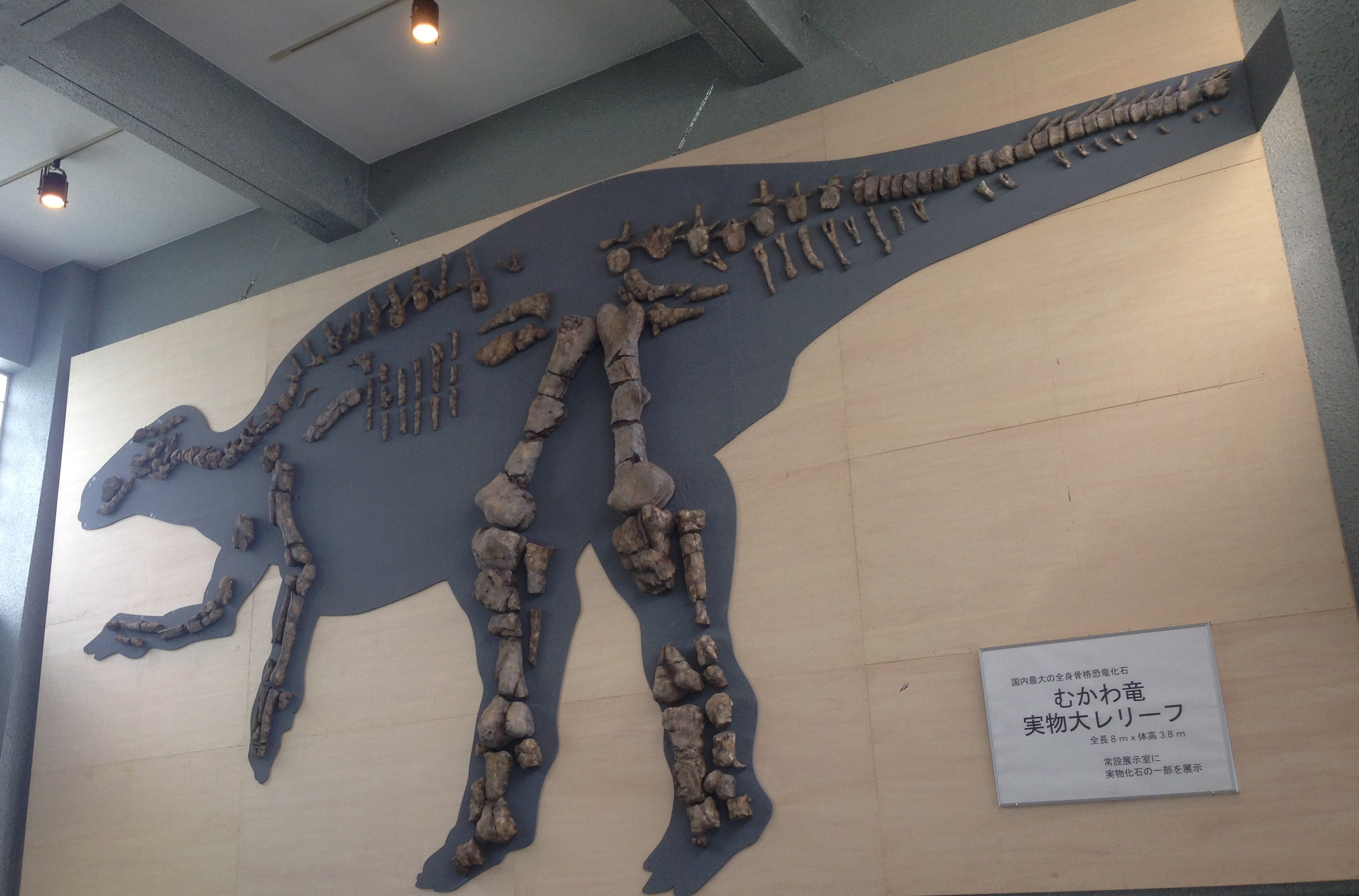 穂別博物館のむかわ竜実物大レリーフ